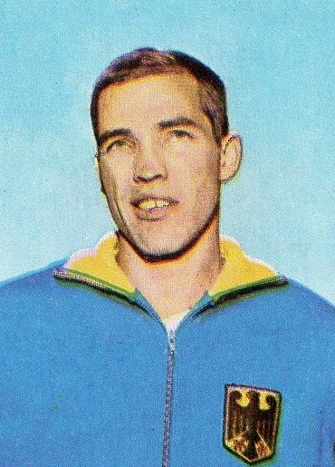 CAMPIONI dello SPORT 1969/70-n.49- HENNIGE -GERMANIA OCC. -ATLETICA-Rec